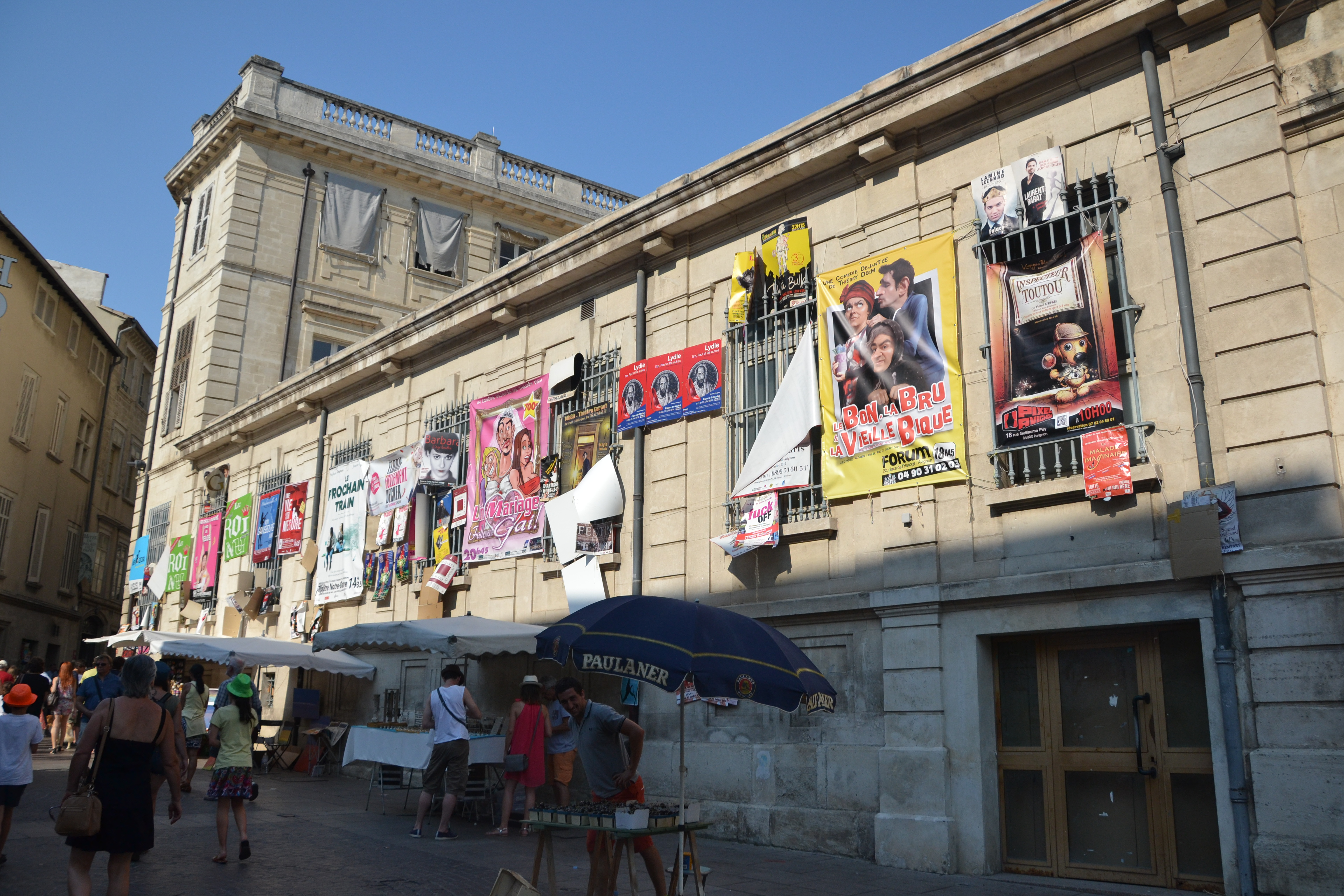 Ambiance festival 2014